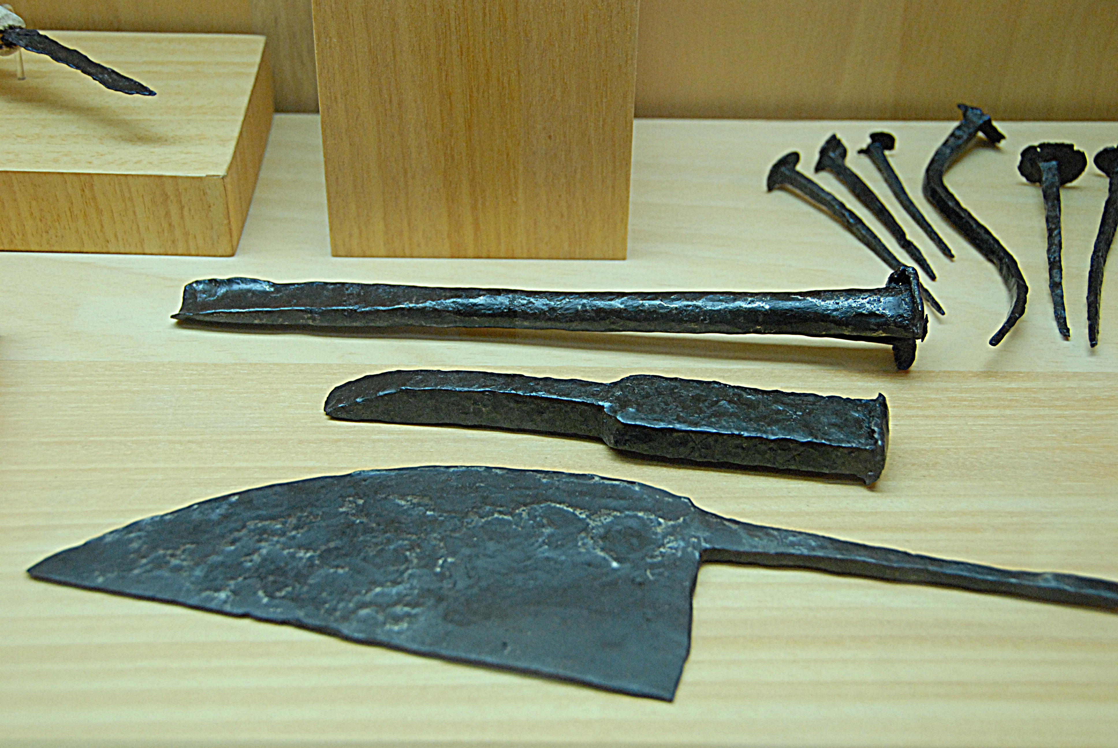 Civaux, Museum, Eisengerätschaften